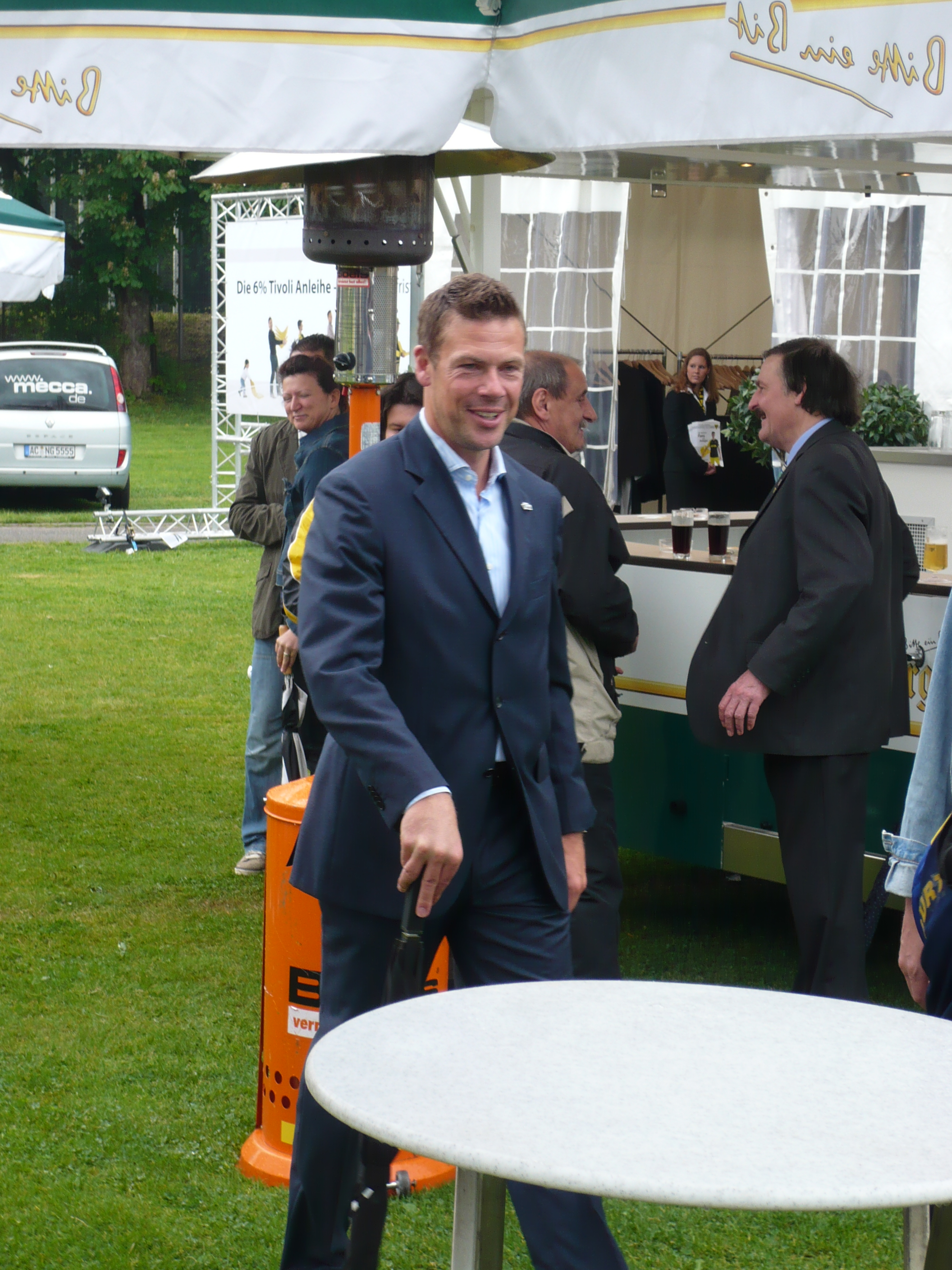 Erik Meijer beim "ersten Spatenstich" für den neuen Tivoli in Aachen am 17. Mai 2008